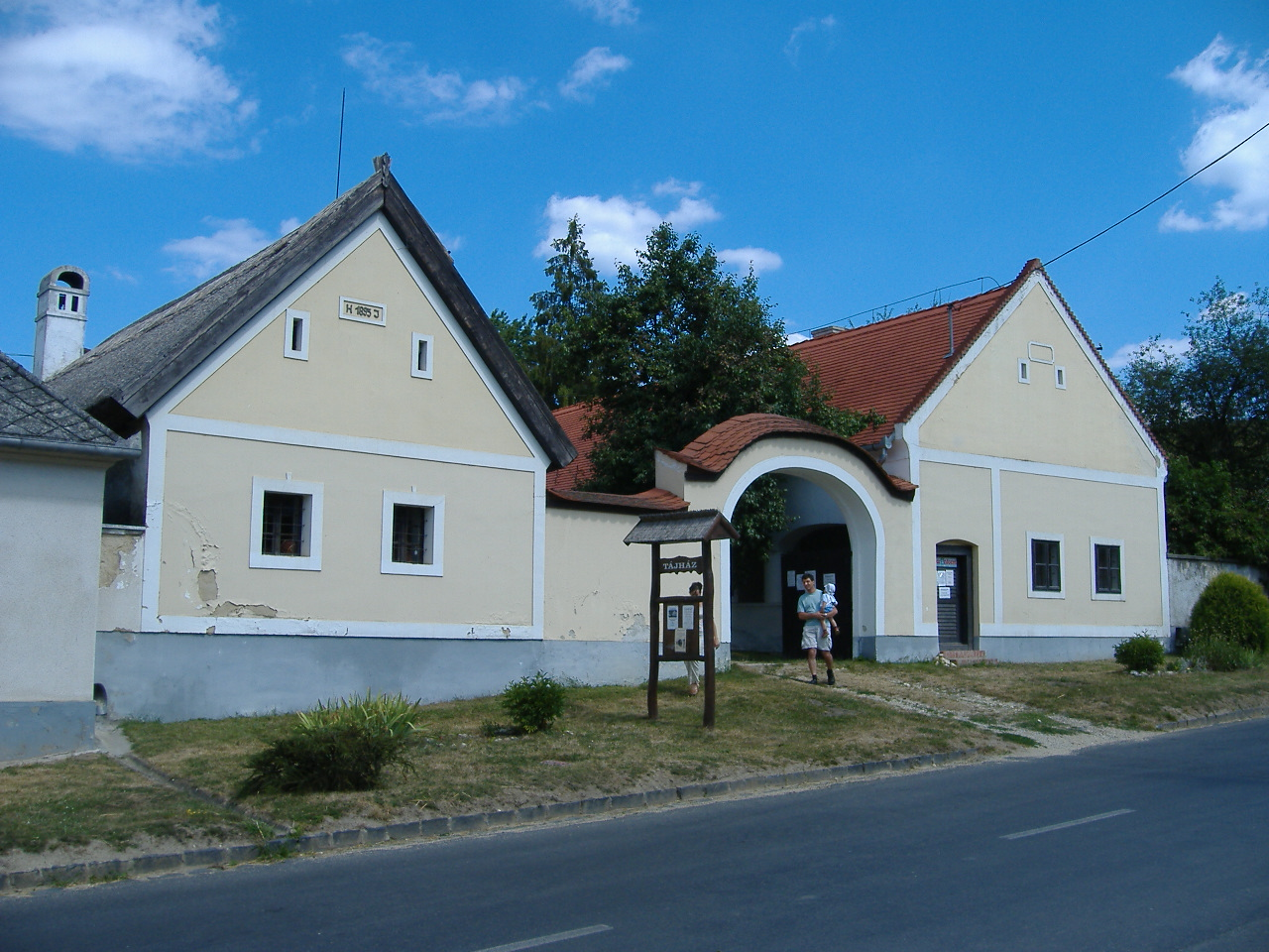 Bakonybél, tájház This is a photo of a monument in Hungary, Identifier: 15925